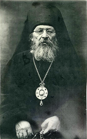 Архиепископ Минусинский и Усинский Димитрий (Вологодский), 1936 г.